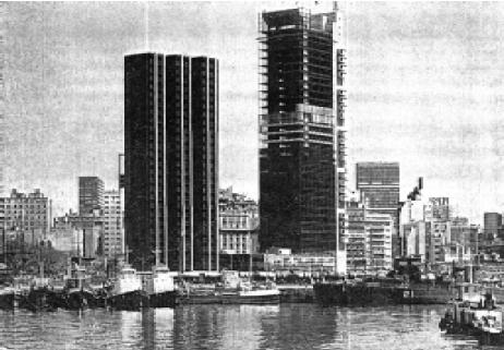 Primeras torres del conjunto Catalinas Norte: Conurban (izq.) y Carlos Pellegrini (o Unión Industrial Argentina) (der.) en construcción aún. Noviembre de 1973, Buenos Aires, Argentina.